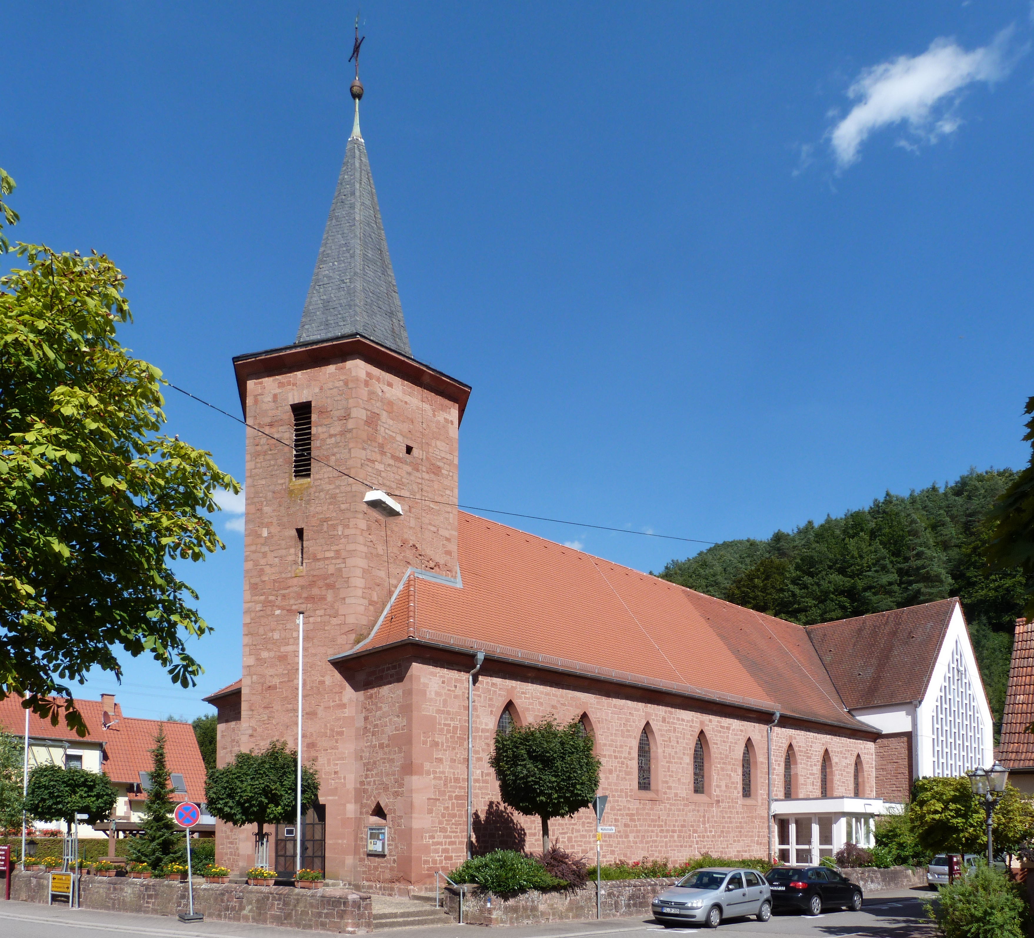 Allerheiligen-Kirche in Lug (Pfalz), aufgenommen am 17.08.2013